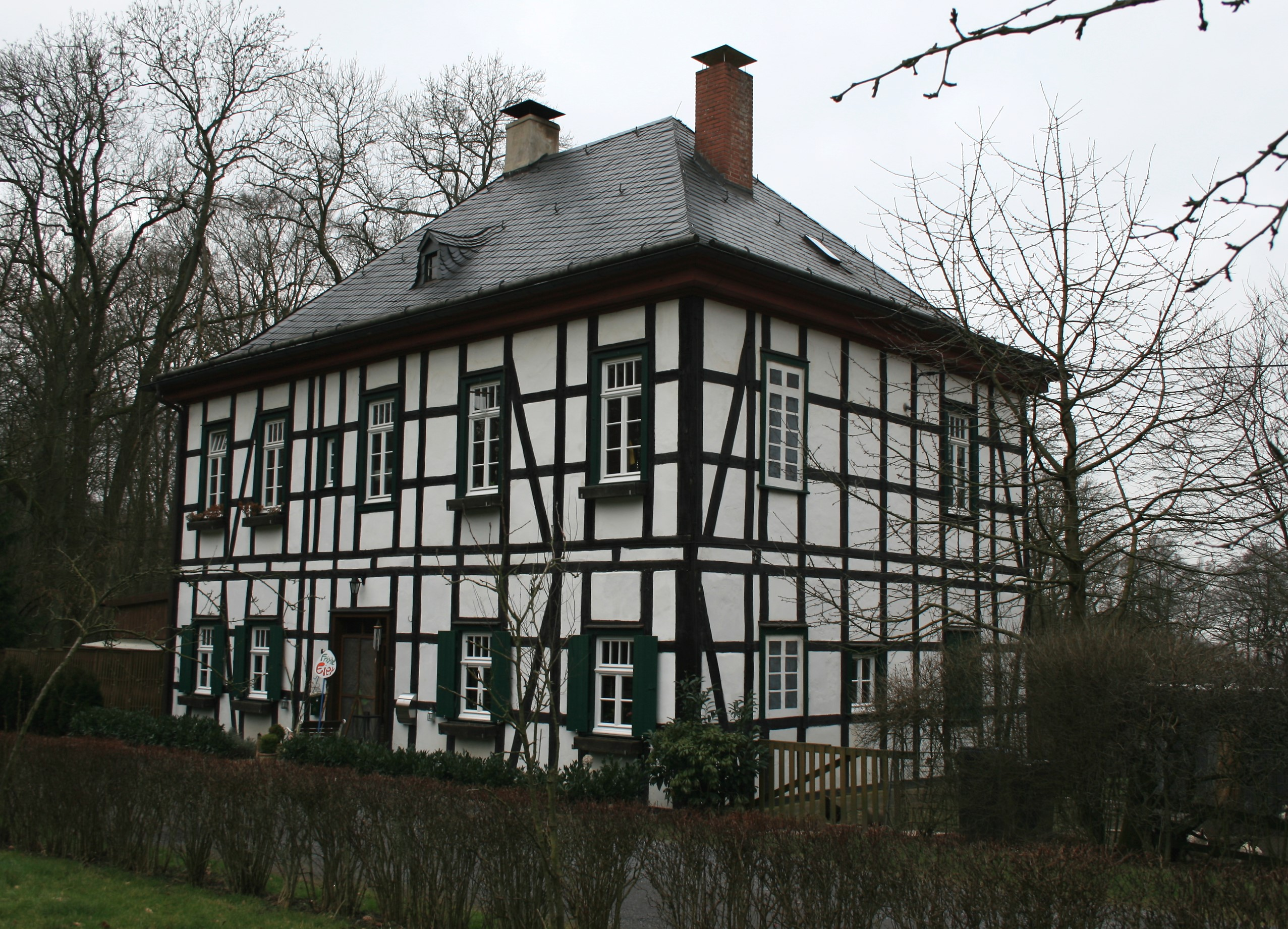 Ehemaliges Forsthaus auf dem Fürstenberg (Höingen) bei Höingen, Gemeinde Ense.